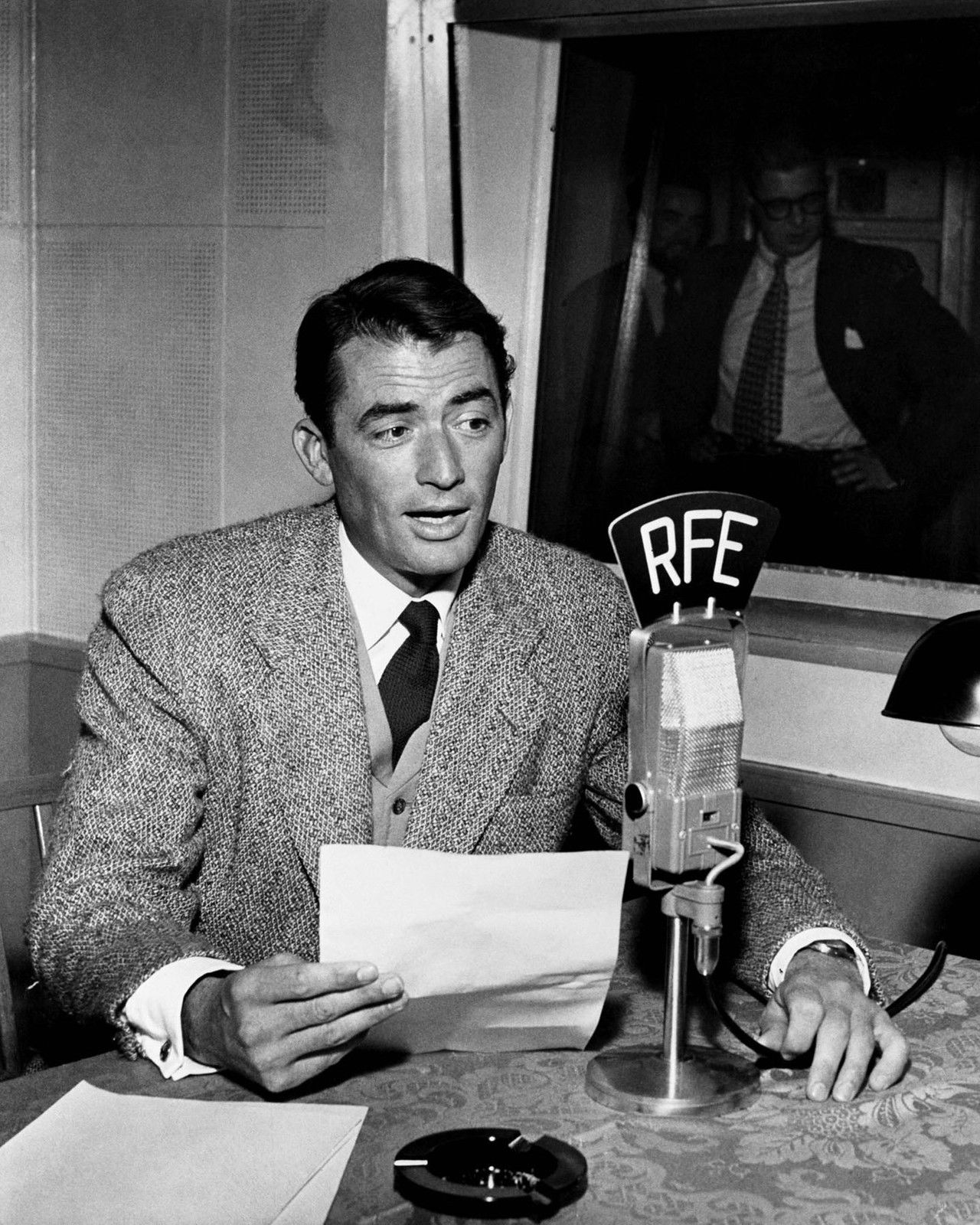 Gregory Peck during a performance on Radio Free Europe, October 22, 1953